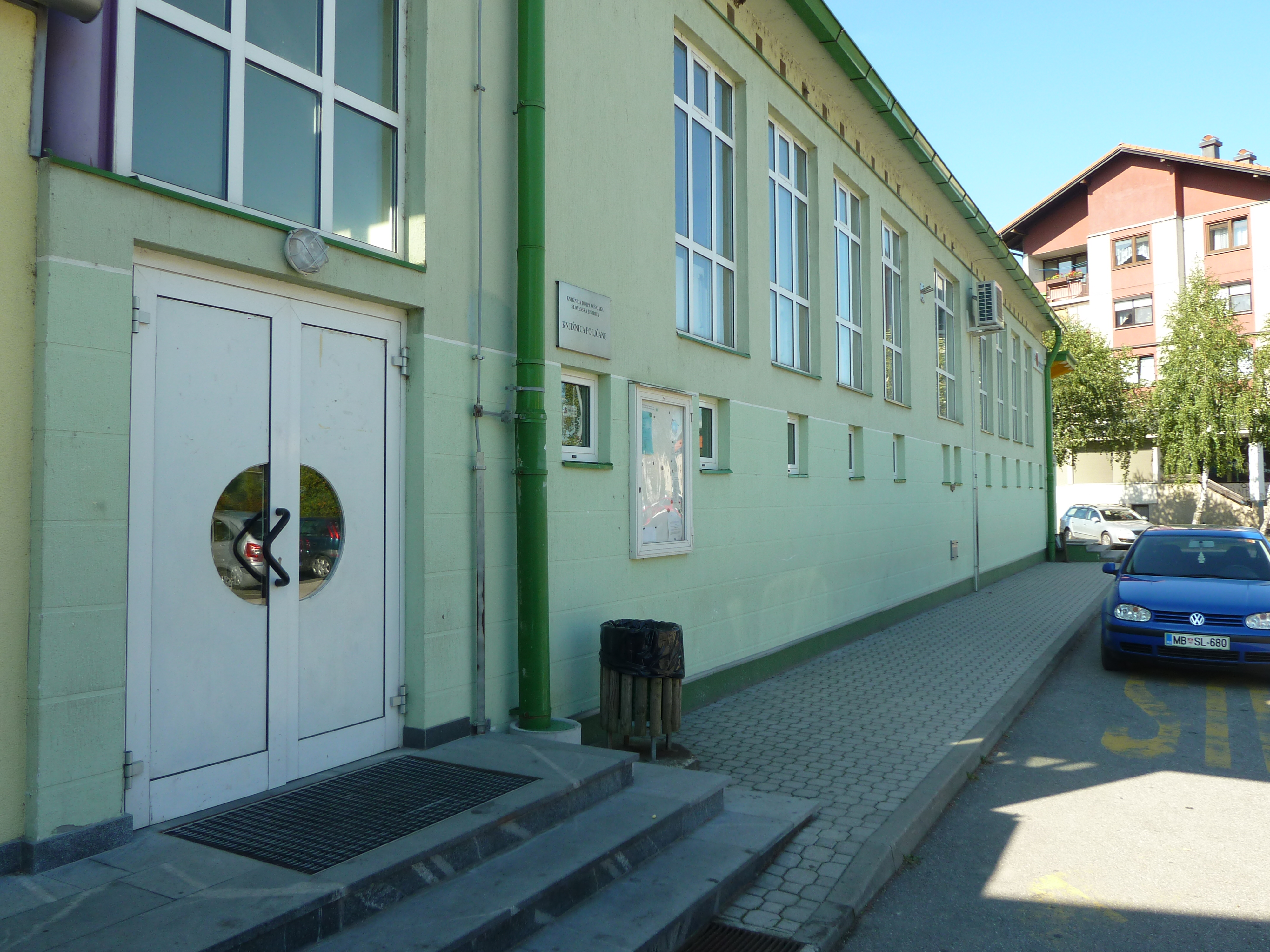 Knjiznica Poljčane - Knjiznica Josipa Vošnjaka 5